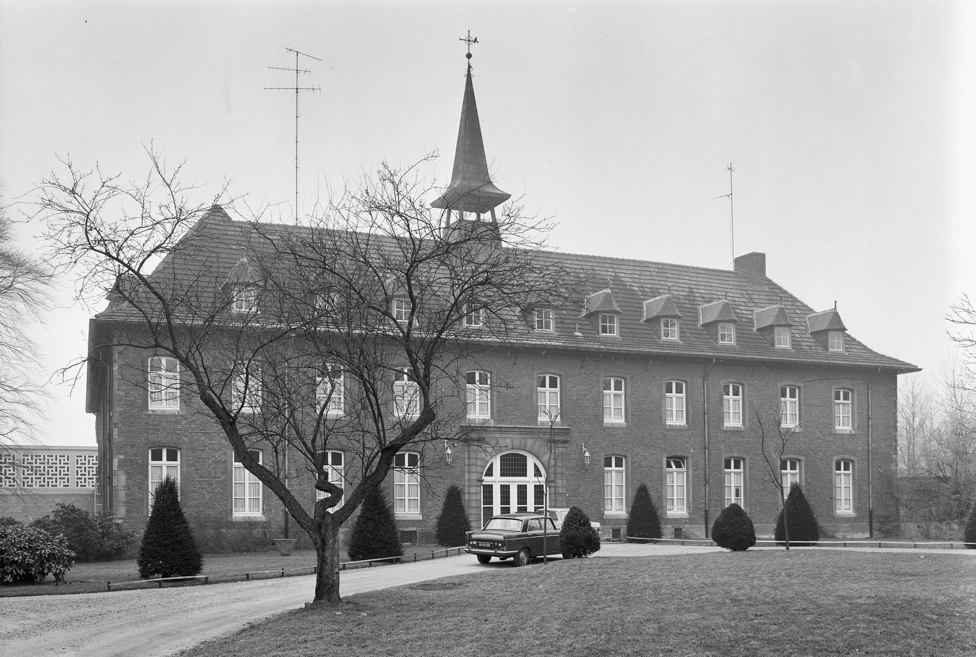 Klooster Sint Elisabethsdal: Overzicht voorgevel (opmerking: Oud adres: Roggelseweg 57)